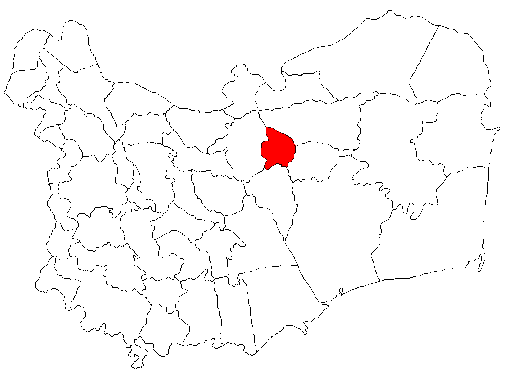 Categorie:Hărţi ale judeţului Tulcea